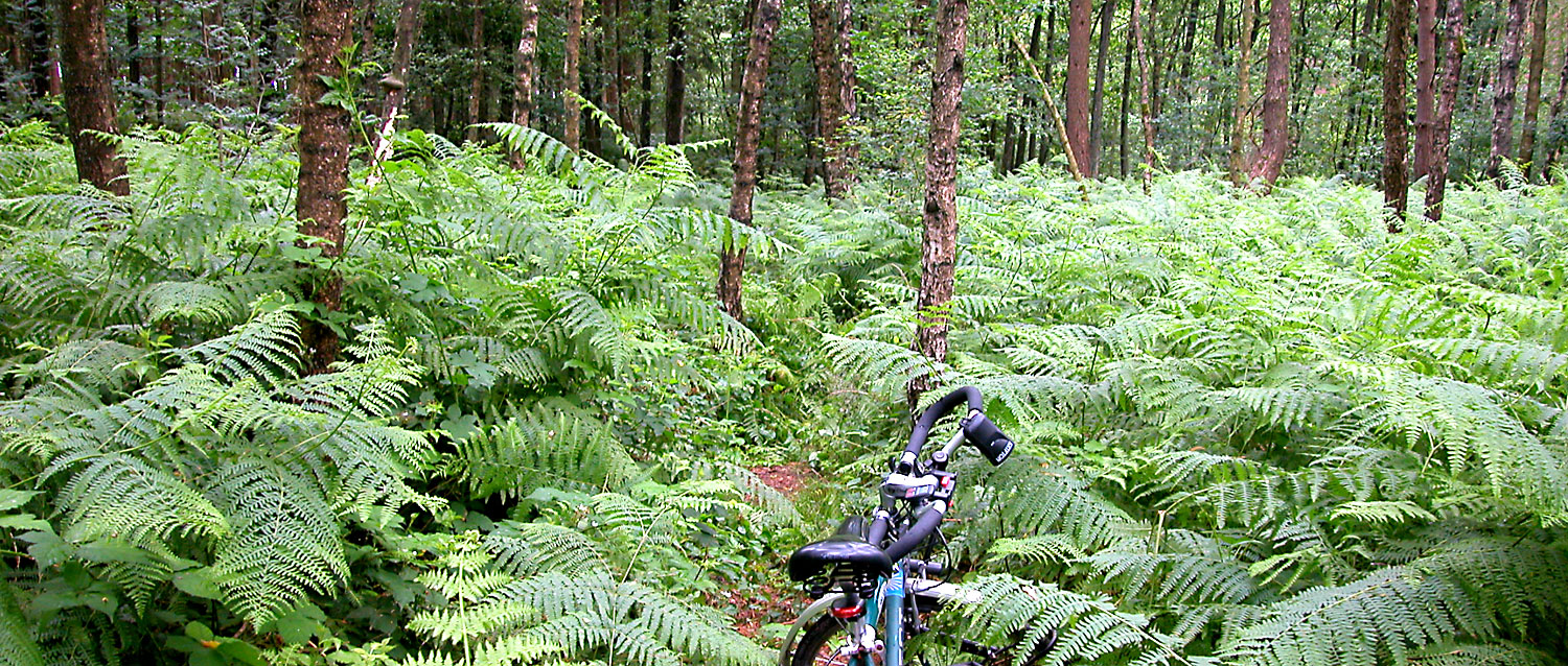 Wald by Kalter Bach. Dorsten-Rhade. Nord-Ost.